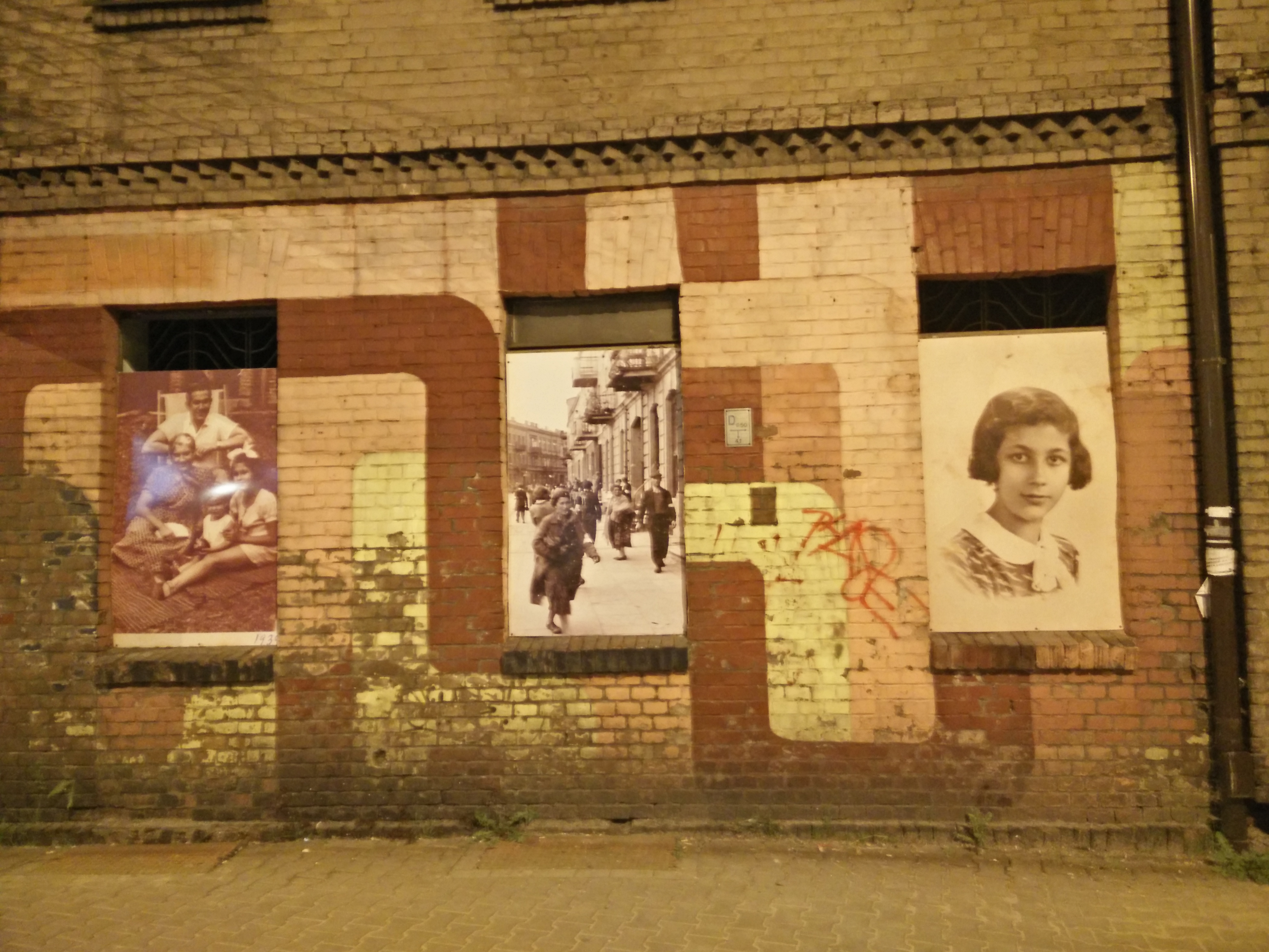 street art będzin, rutka laskier